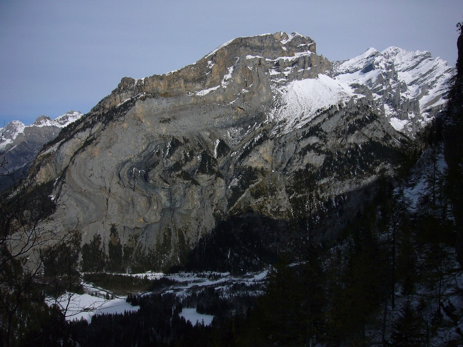 Innerer Fisistock und Doldenhorn (rechts) aus Richtung Südwesten